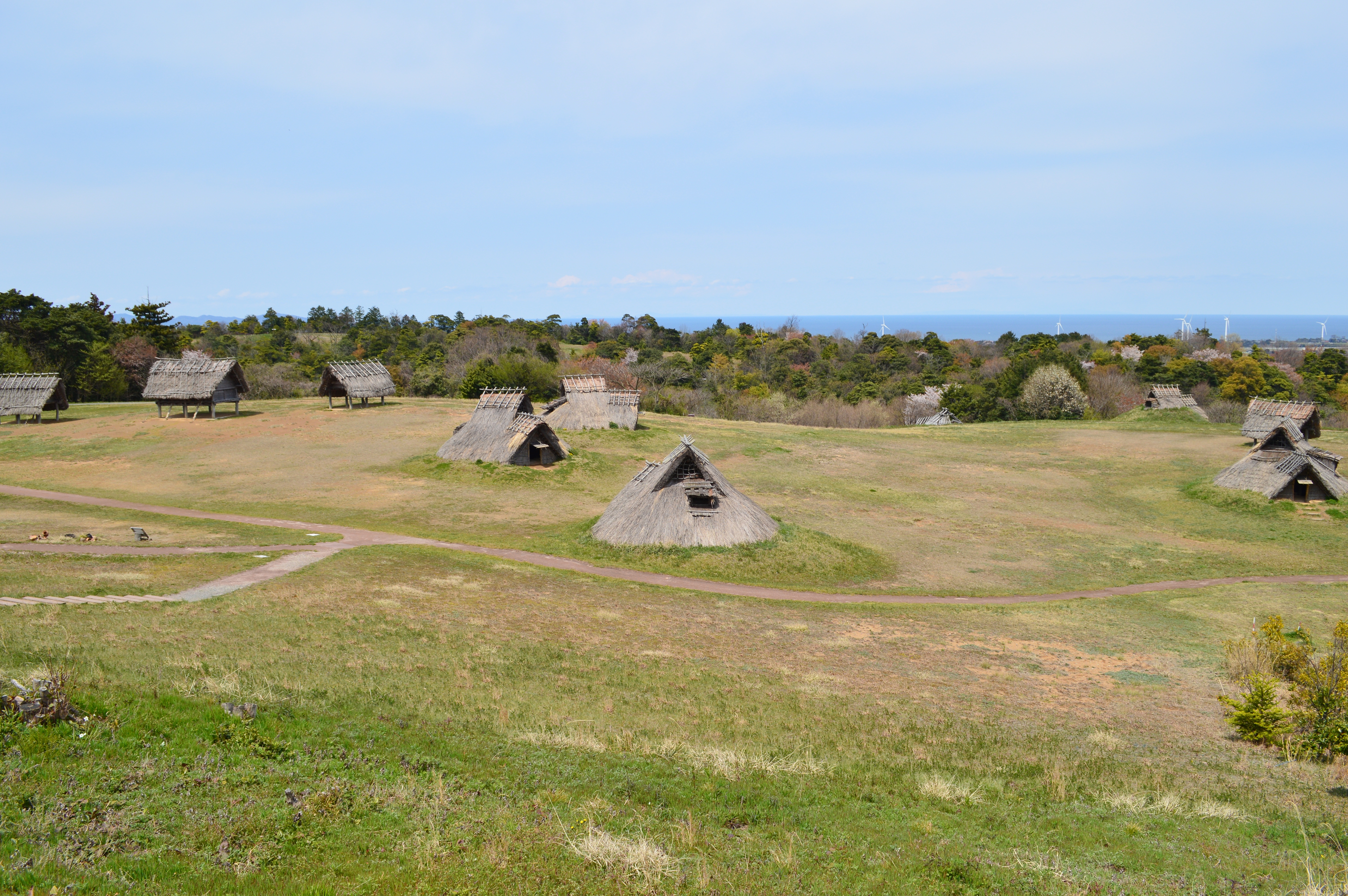 妻木晩田遺跡 妻木山地区 遠景 Nikon D3200